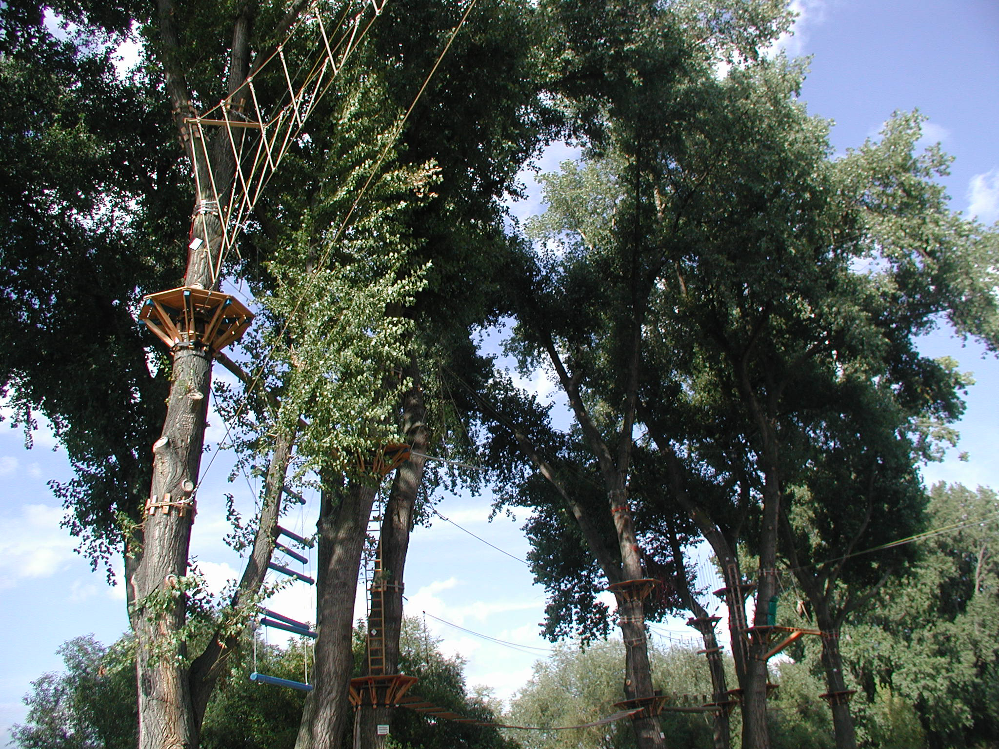 Köln, Rhein-und-Jugendpark. Der Hochseilgarten